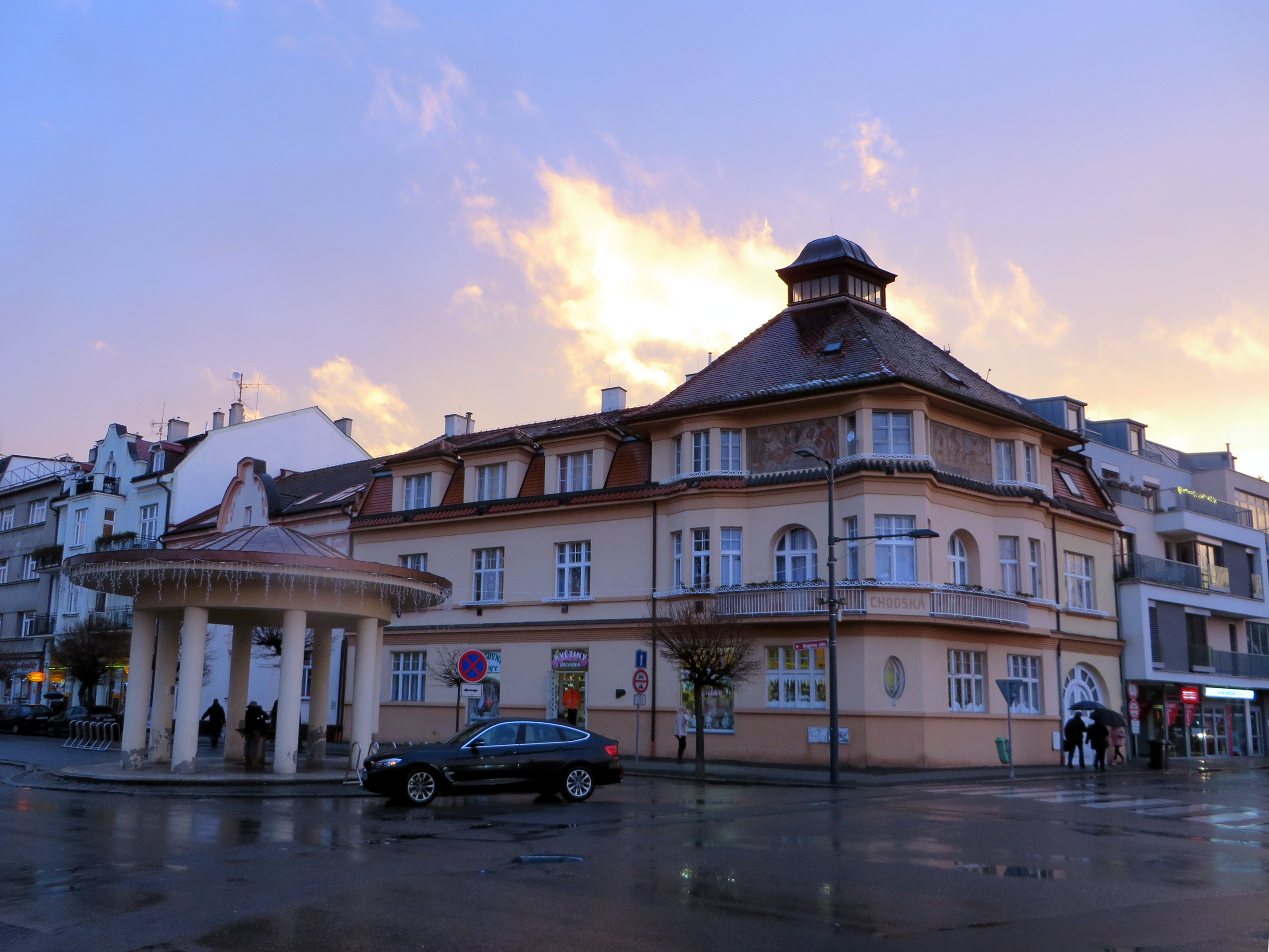 Druhá budova poděbradského lázeňského penzionu Chodská. První na ní navazovala po pravé straně, dnes tam je moderní budova.